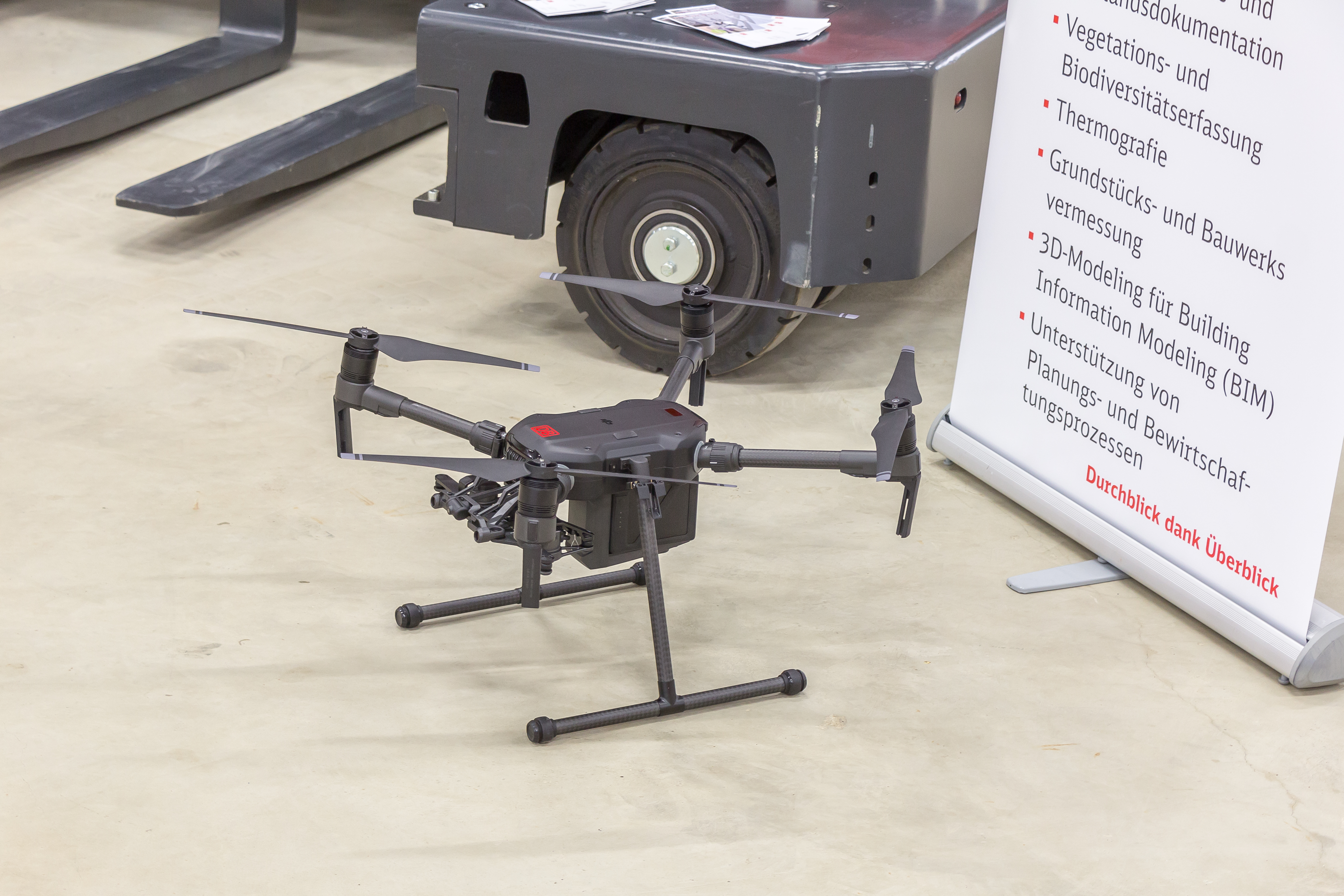 Besichtigung ICE-Instandhaltungswerk Köln-Nippes Februar 2018 Foto: Die Deutsche Bahn setzt Quadrokopter/Drohnen zur Erfassung/Vermessung von Bauwerken und Gelände ein